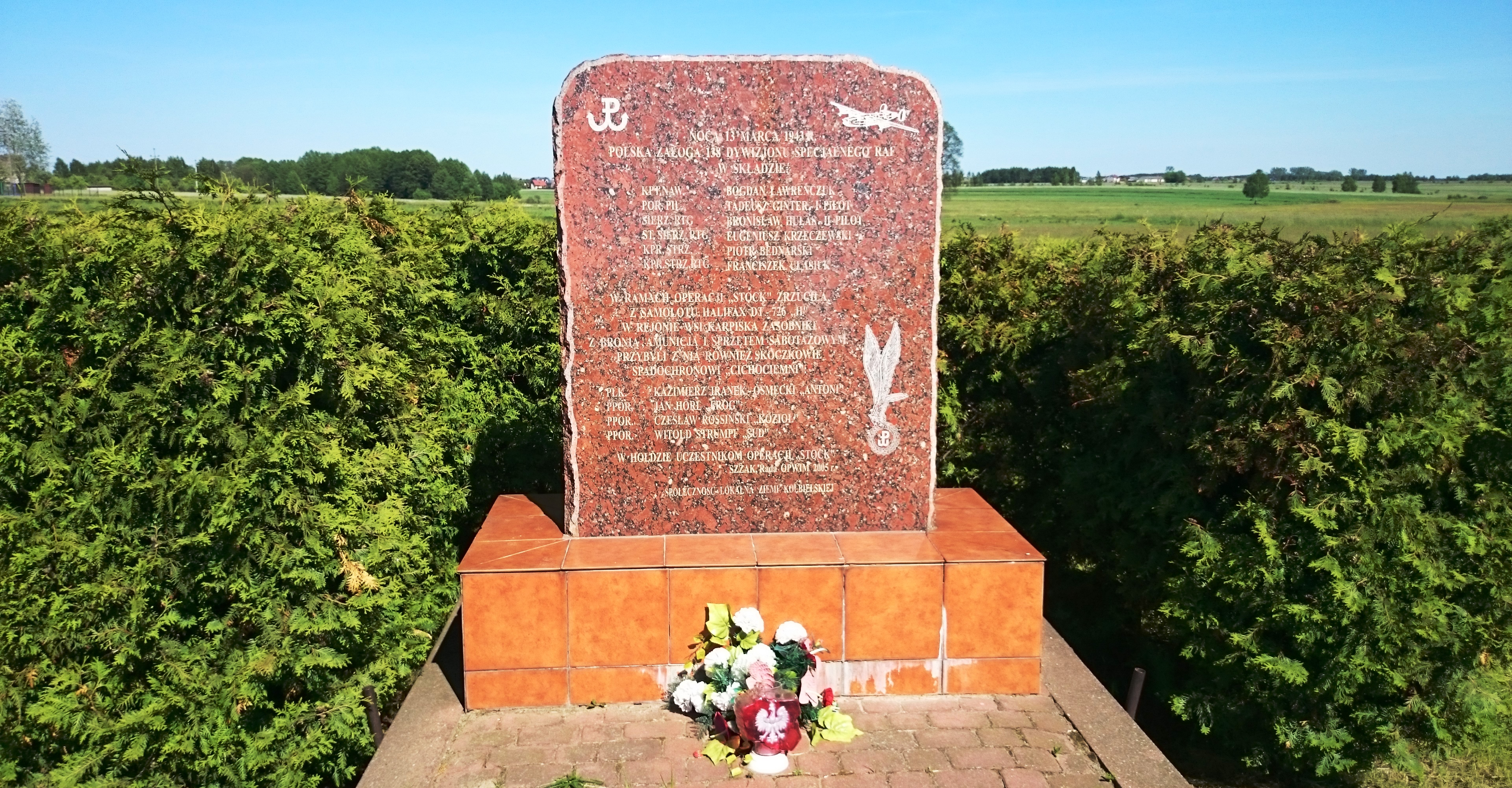 Kamień upamiętniający miejsce zrzutu cichociemnych, którego dokonano w nocy z 13 na 14 marca 1943 roku w ramach operacji „Stock” dowodzonej przez kpt. naw. Bogdana Ławreńczuka (zrzut na placówkę odbiorczą „Koza” między Celestynowem a Pilawą, w okolicy wsi Karpiska).